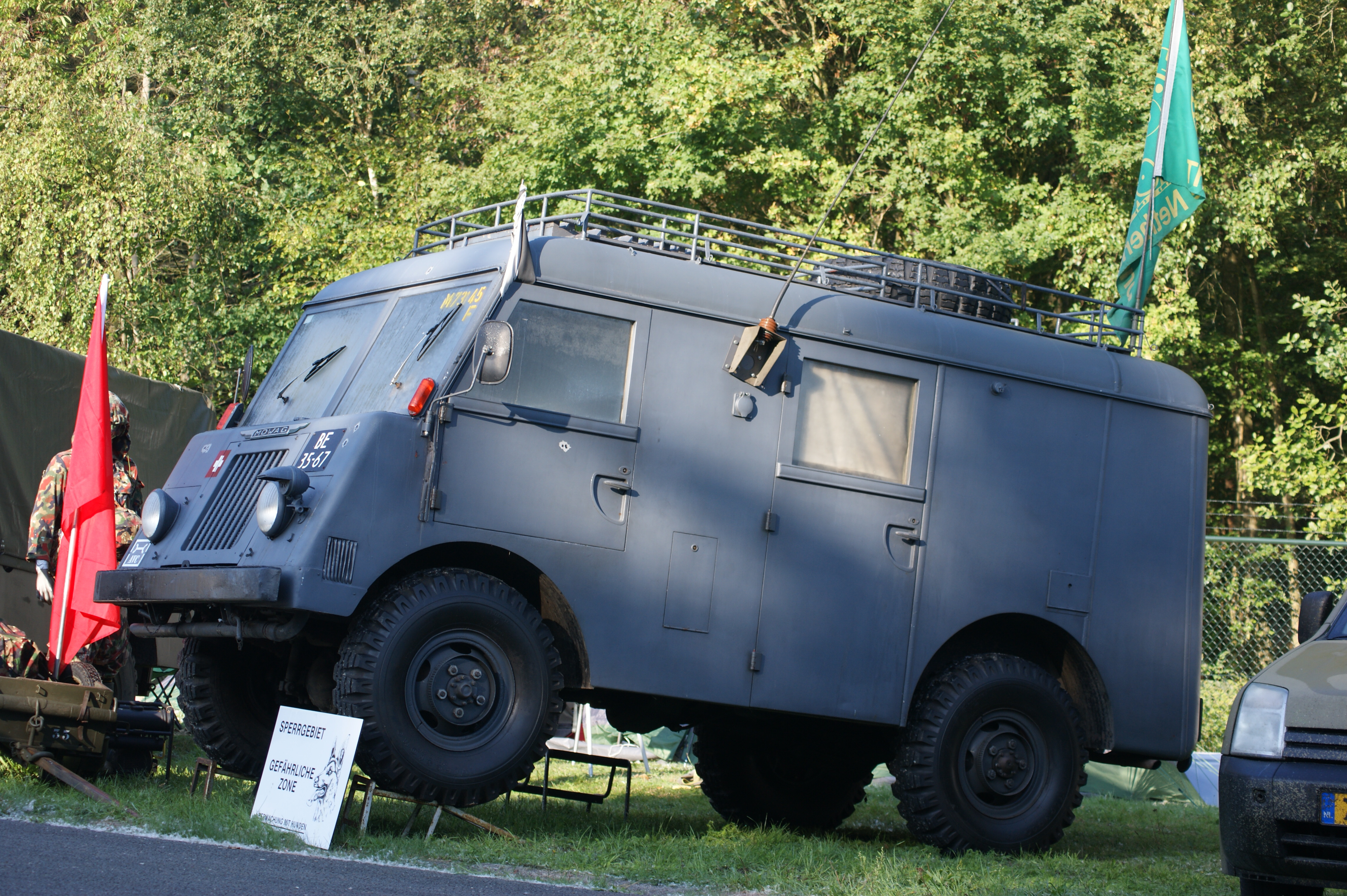 Mowag GW3500 Funkkommandowagen (FKW)